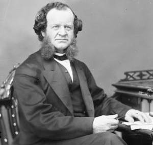 John Wallace, M.P. (Albert, N.B.) b. 1812